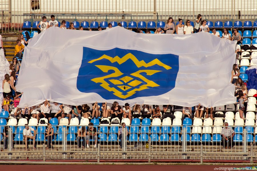 Герб Тольятти - один из элементов декора в ходе фестиваля на стадионе Торпедо в честь Дня города Тольятти 2012